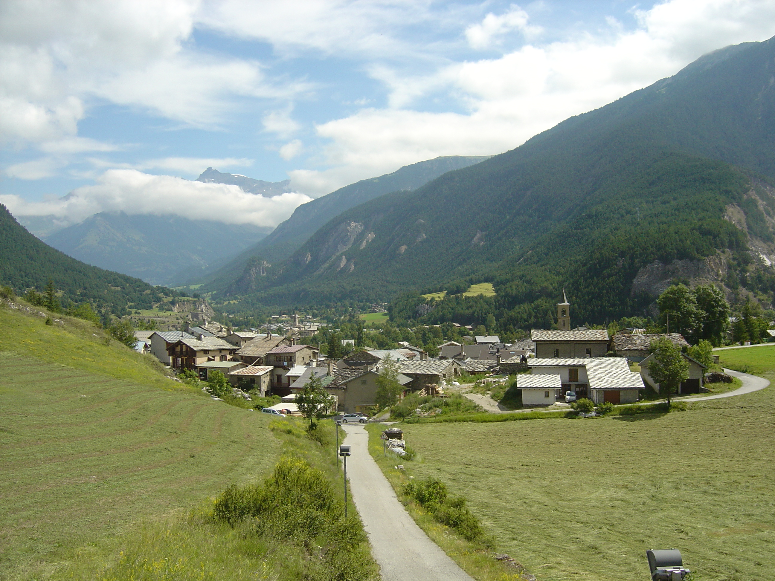 Vue générale de Bramans